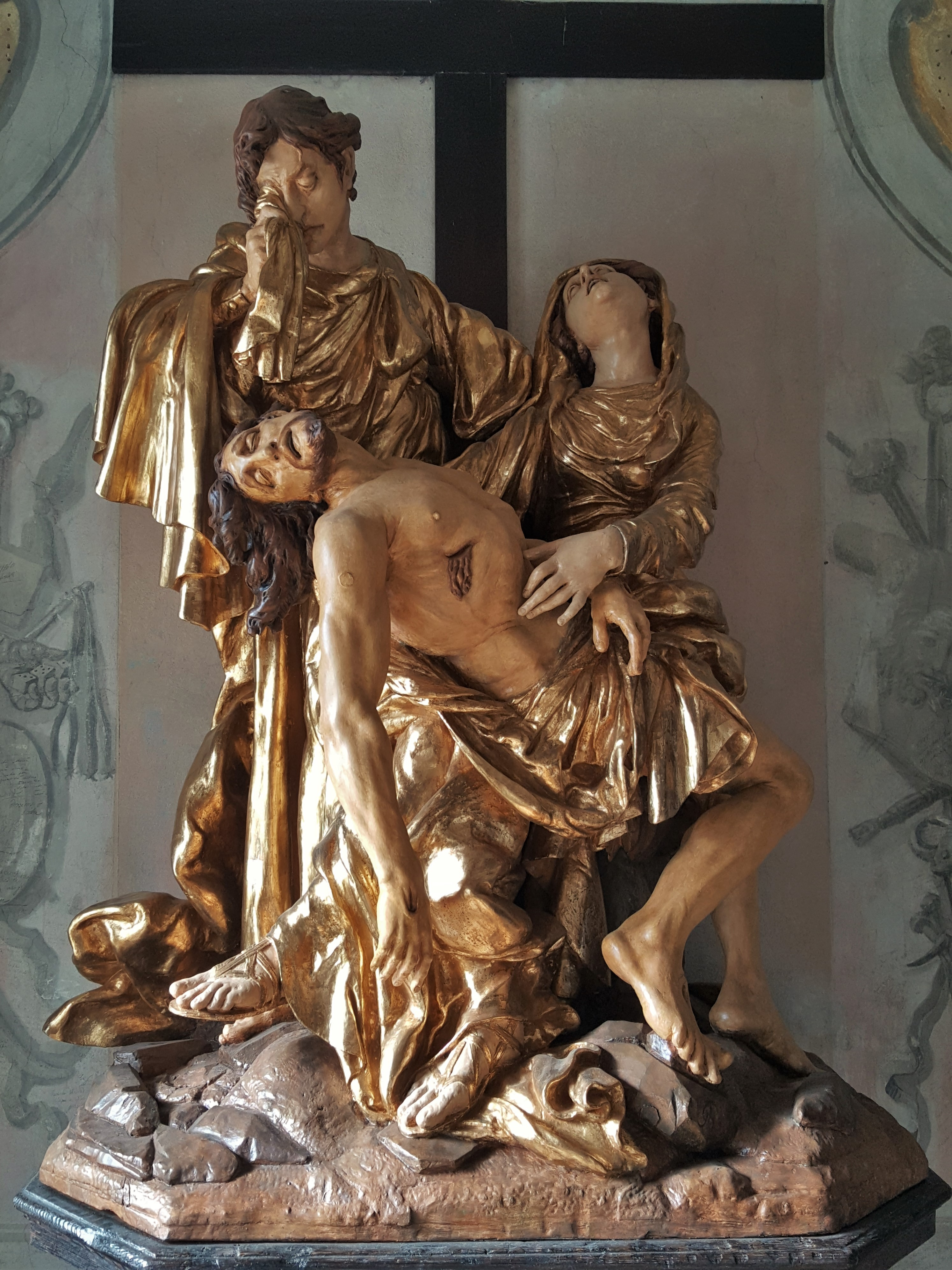 Sousoší Piety (kol. 1731), Svaté schody v premonstrátské rezidenci na Svatém Kopečku u Olomouce - Jiří Antonín Heinz